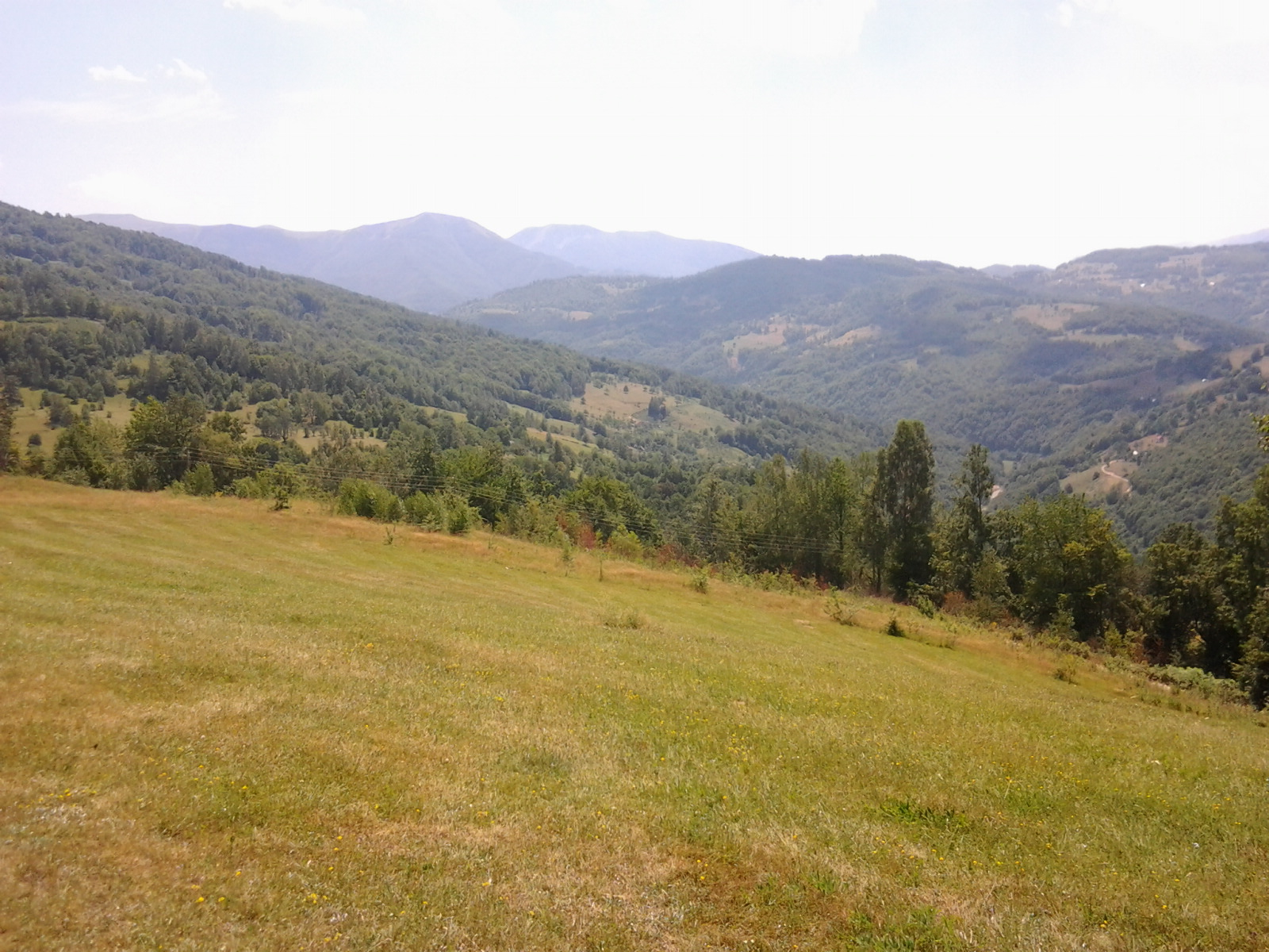 Јабучно, Бијело Поље, Црна Гора.